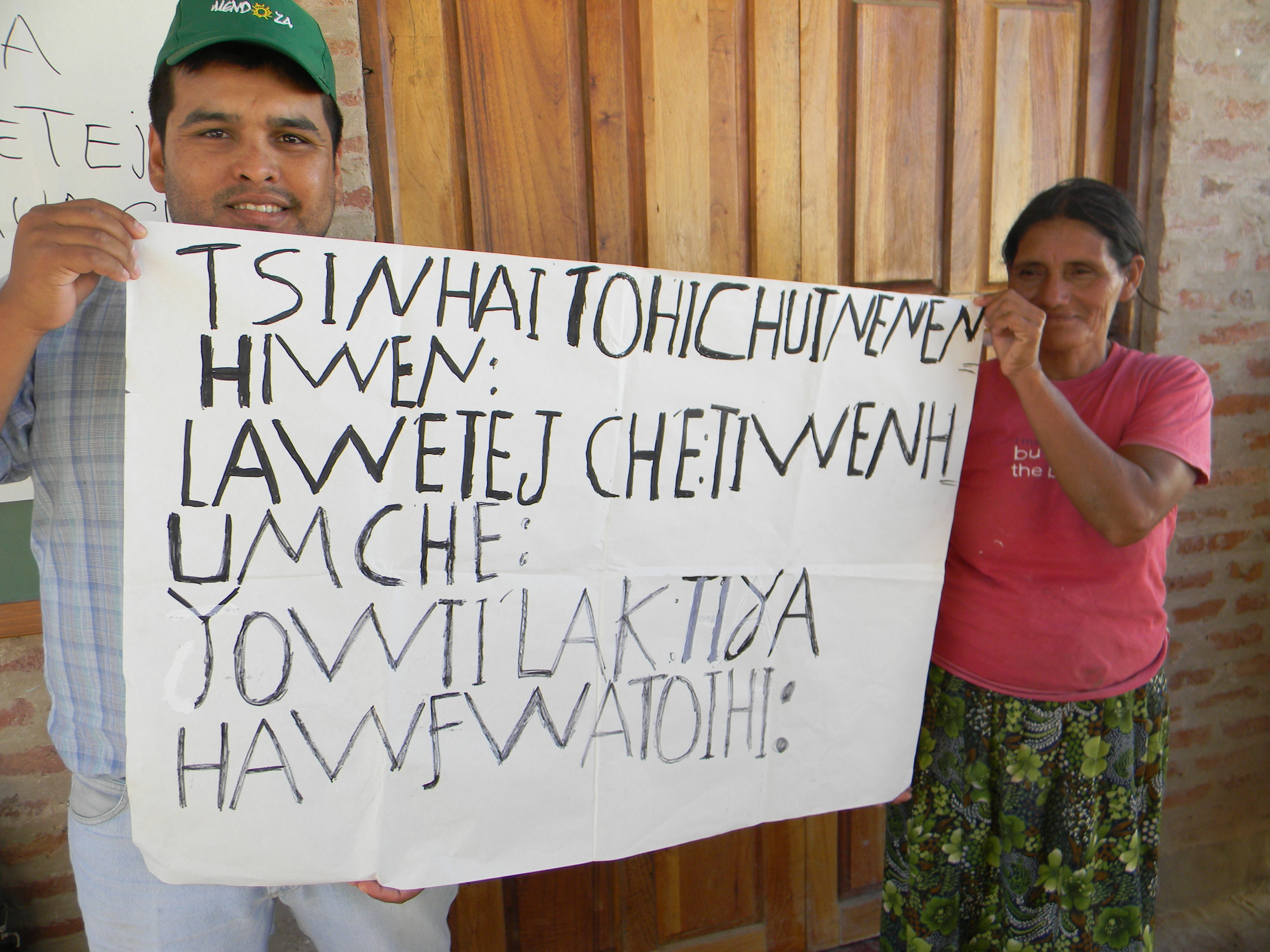 Las acciones que lleva adelante ANSES orientadas a los pueblos originarios aseguran la presencia de la seguridad social, con criterios de pluralidad, inclusión y participación de las comunidades donde el organismo acciona. Actualmente, el organismo previsional desarrolla diferentes programas que abordan la cuestión indígena de una manera integral: capacitación presencial, campaña informativa en lenguas originarias y entrega de netbooks en escuelas de Educación Intercultural Bilingüe. Desde 2009, implementa el programa Bienestar para nuestra gente de capacitación en Seguridad Social para los pueblos indígenas. El programa tiene como propósito garantizar el acceso de los pueblos indígenas a las prestaciones de la Seguridad Social, desde el respeto y valorización de su identidad cultural. La iniciativa contempla el mejoramiento de los canales institucionales para la tramitación de las prestaciones de ANSES y formación y capacitación sobre los derechos. Para complementar las jornadas de formación y ampliar el impacto, durante 2011 trabajó en una campaña informativa en diversas lenguas indígenas para realizar afiches y micros radiales sobre la Asignación Universal y por Embarazo, la posibilidad de obtener una jubilación y los derechos sociales que otorga ANSES. La campaña informativa en lenguas indígenas se realizó de manera participativa, por eso ANSES realizó jornadas junto a qom y wichis de Ing. Juarez en Formosa y con mbya guaraní de Aristóbulo del Valle, Misiones. Todas las comunidades recibieron con entusiasmo la propuesta y emprendieron el trabajo de realizar las traducciones en conjunto. En cada una de los encuentros se debatía acerca del significado para la comunidad de las prestaciones que brinda ANSES y los maestros bilingües fueron los encargados de las traducciones tanto para el guión del spot radial como para el texto de la pieza gráfica.